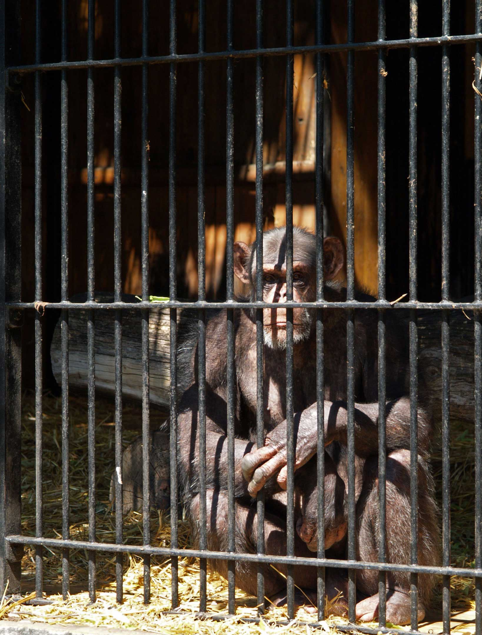 Chimpanzee (Pan) in Warsaw zoo